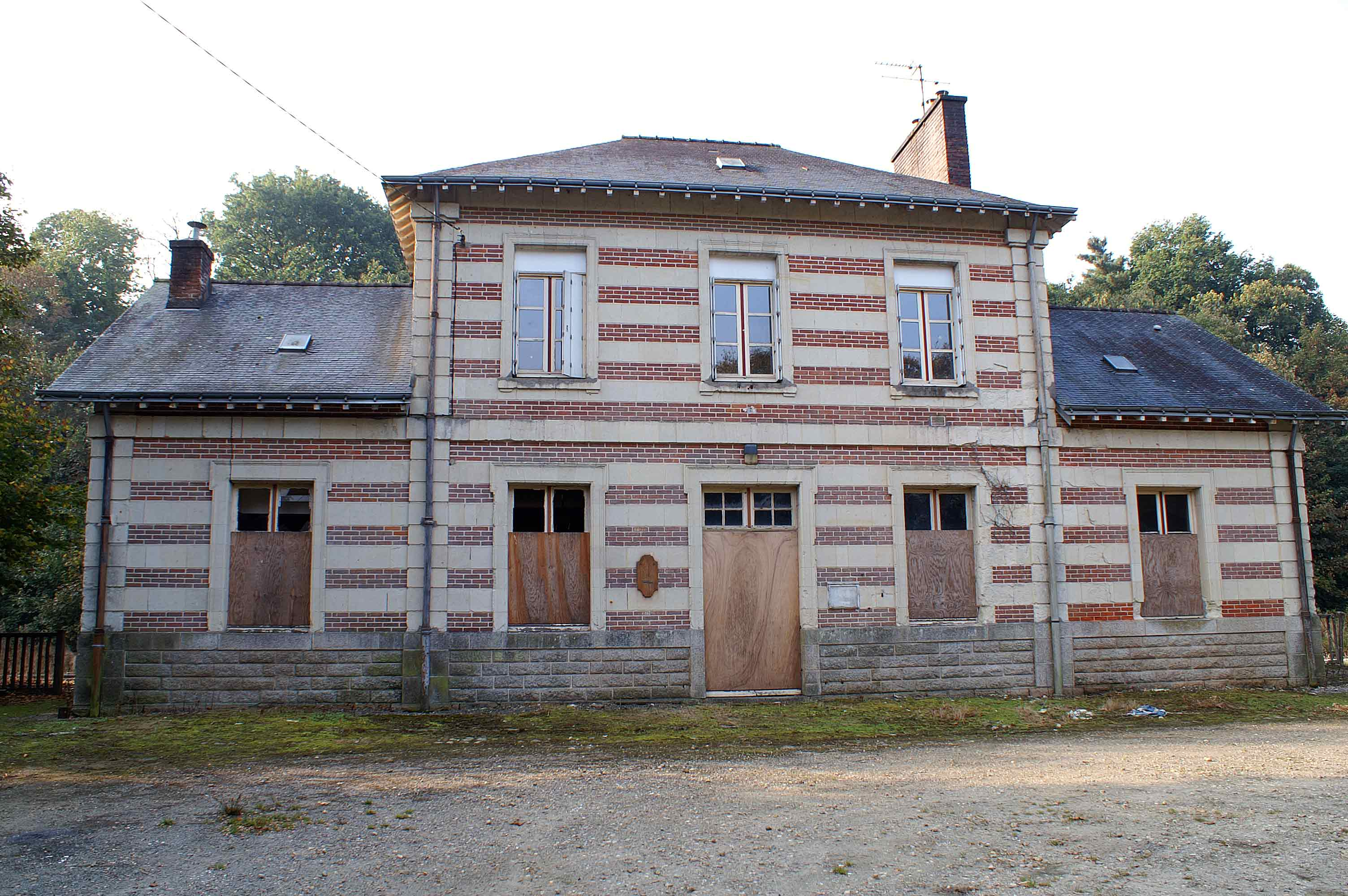 Bâtiment voyageur de la gare de Baud, côté extérieur. le bâtiment est fermé et semble-t-il inutilisé.